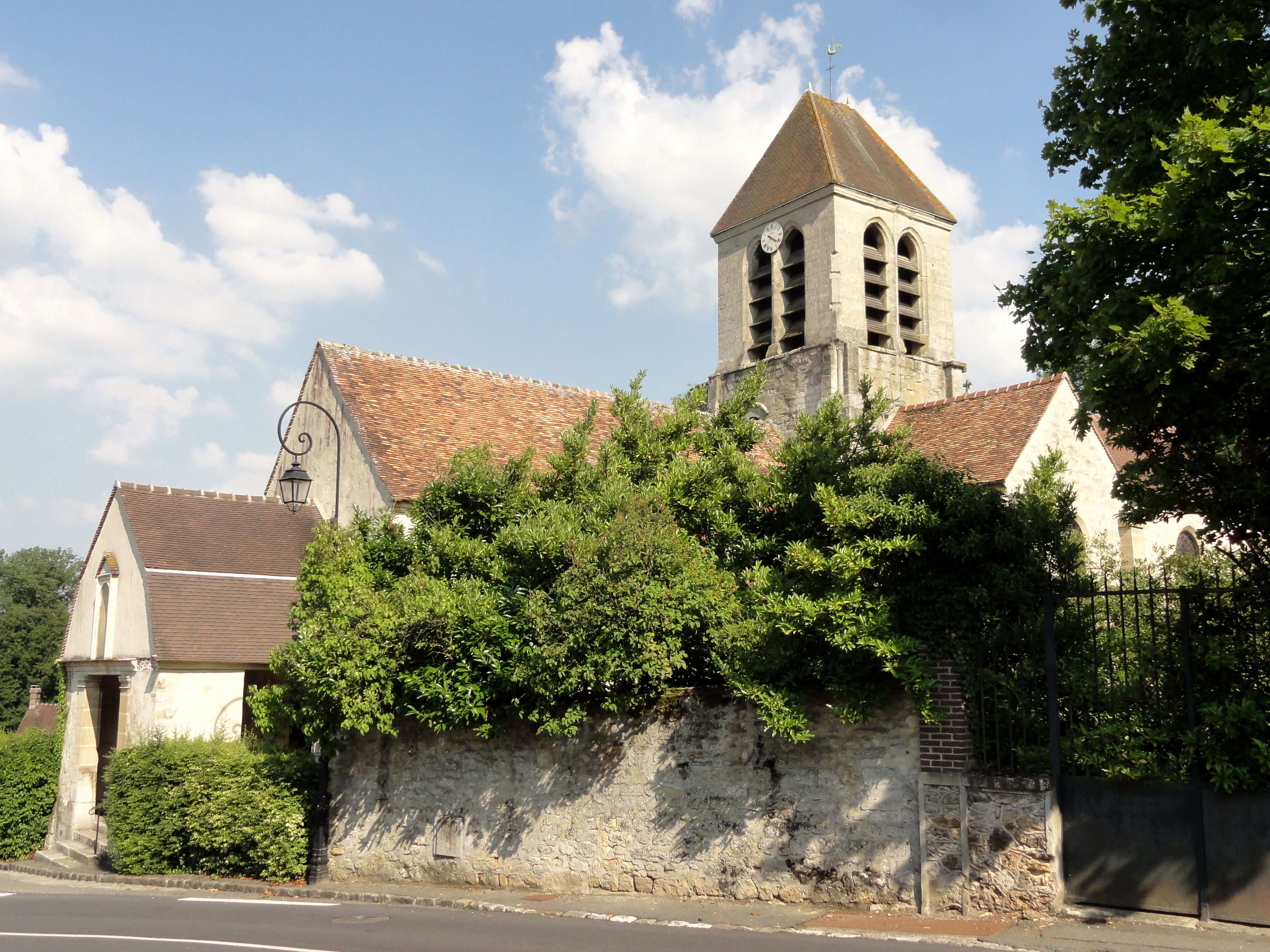 Vue depuis le sud : l'église est peu visible, car une propriété privéee s'en rapproche de très près.